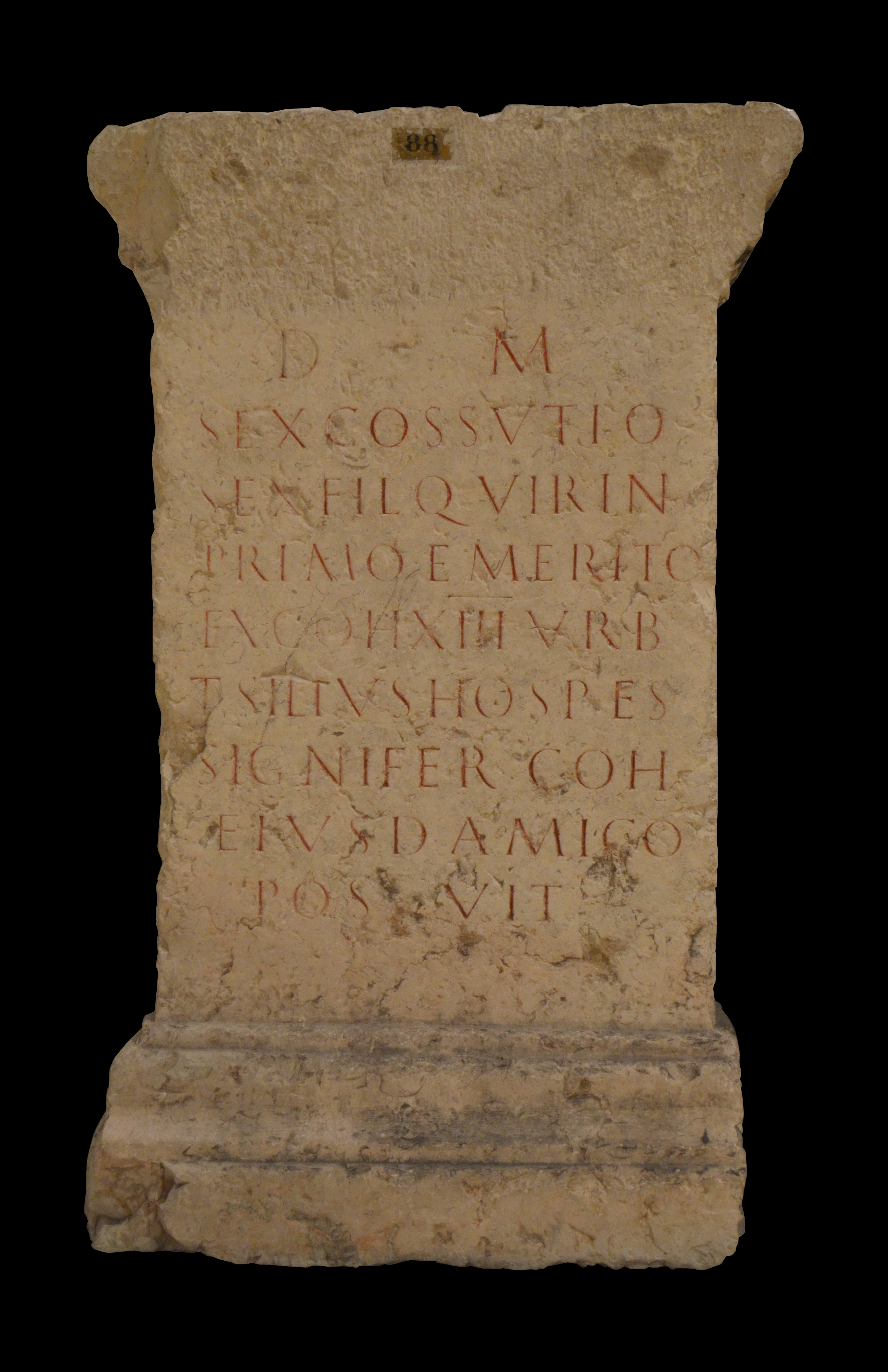 Musée gallo-romain de Fourvière (Lyon) - Cippe avec base et couronnement tronqué qui se trouvait autrefois dans l'église Saint-Irénée. Haut. 95cm ; larg. 48cm. D(iis) M(anibus) / Sex(to) Cossutio / Sex(ti) fil(io) Quirin(a) / Primo emerito / ex coh(orte) XIII Urb(ana) / T(itus) Silius Hospes, signifer coh(ortis) / eiusdem amico / posuit. Aux dieux Mânes, à Sextus Cossutius Primus, fils de Sextus (Cossutius), de la tribu Quirina, émérite de la XIIIe cohorte Urbana, Titus Silius Jospes, porte-enseigne de cette même cohorte a élevé (ce tombeau) à son ami.